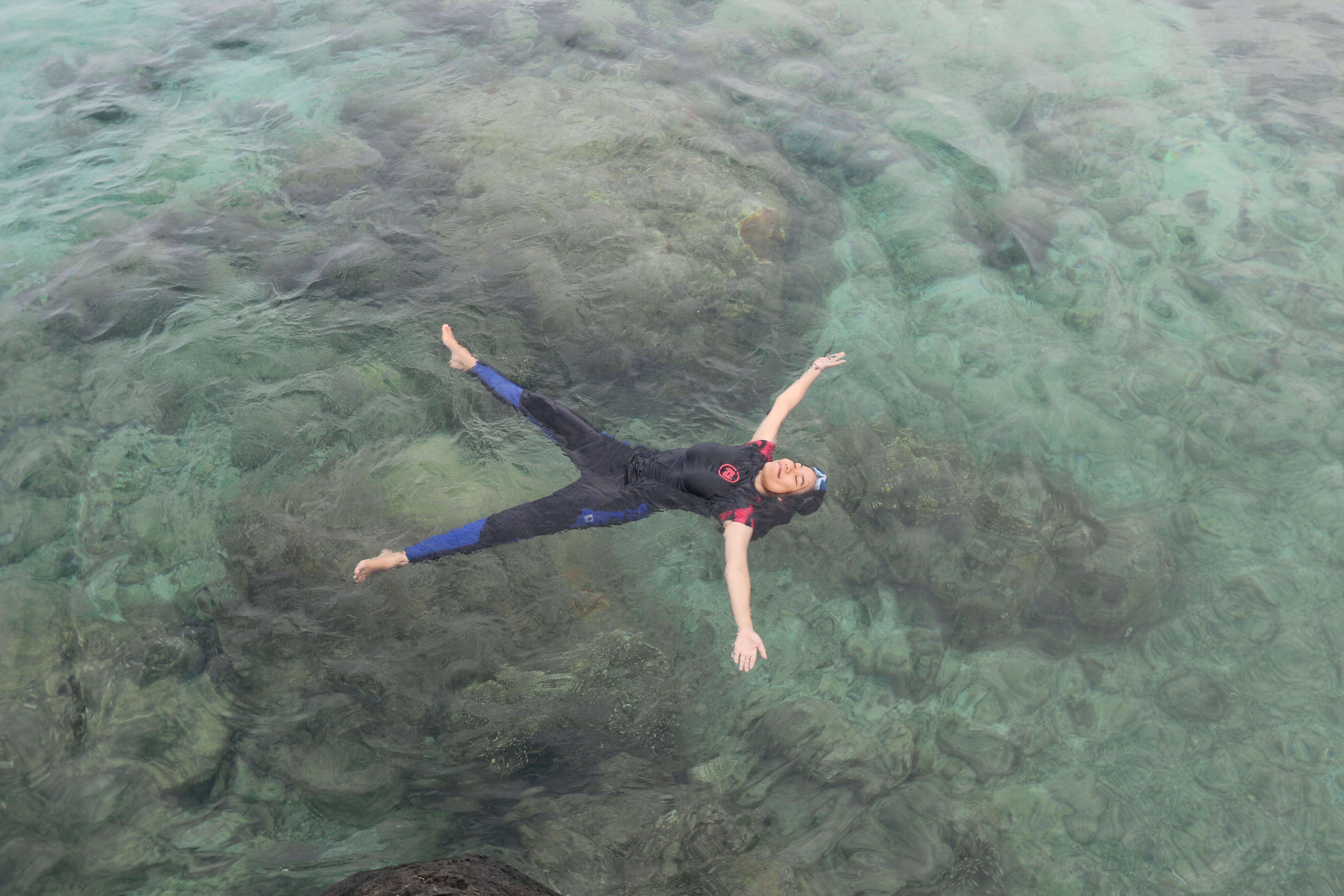 Renang Maradapan